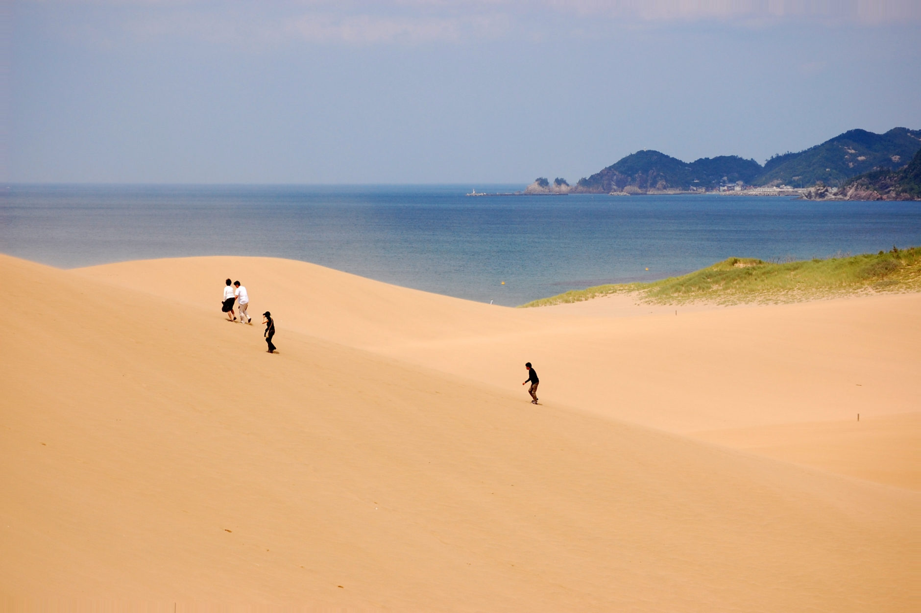 Tottori sand dunes